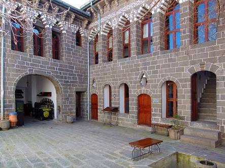 Cahit Sıtkı Tarancı Müzesi, Diyarbakır'ın Sur ilçesinde yer alan bir müzedir. Diyarbakır doğumlu şair Cahit Sıtkı Tarancı'nın doğup büyüdüğü evdir. Ev, 1733 yılında inşa edilmiştir.